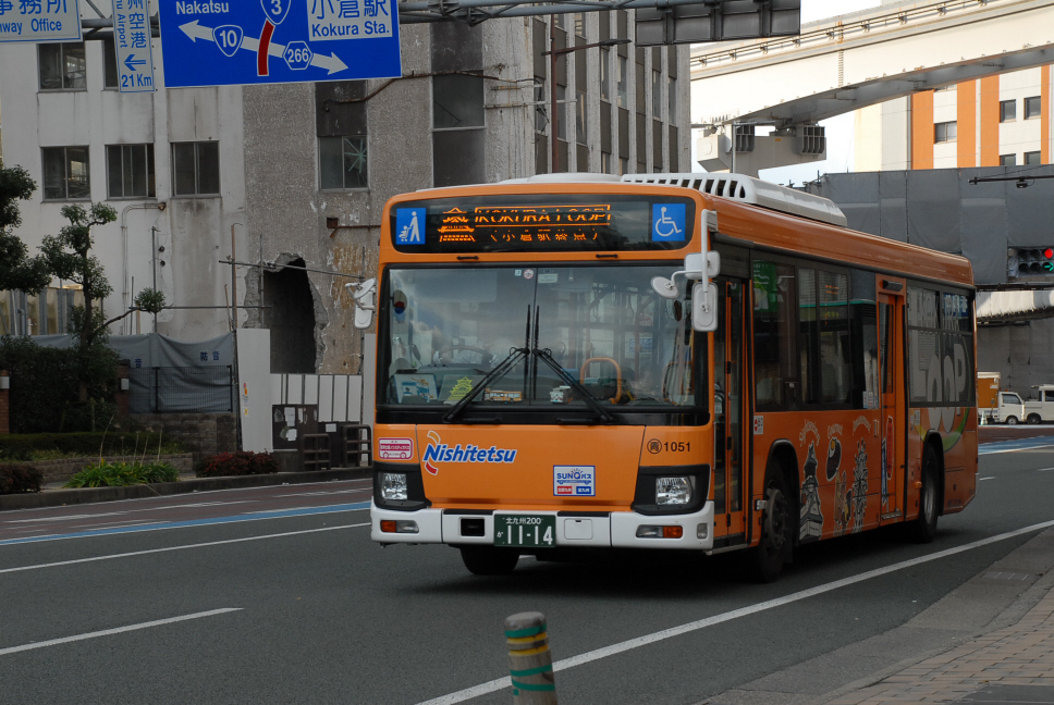 最終日 小倉北区にて撮影